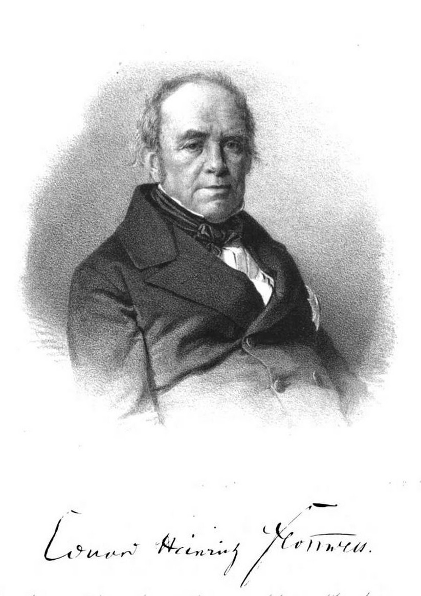 Heinrich Eduard von Flottwell, Portrait um 1860